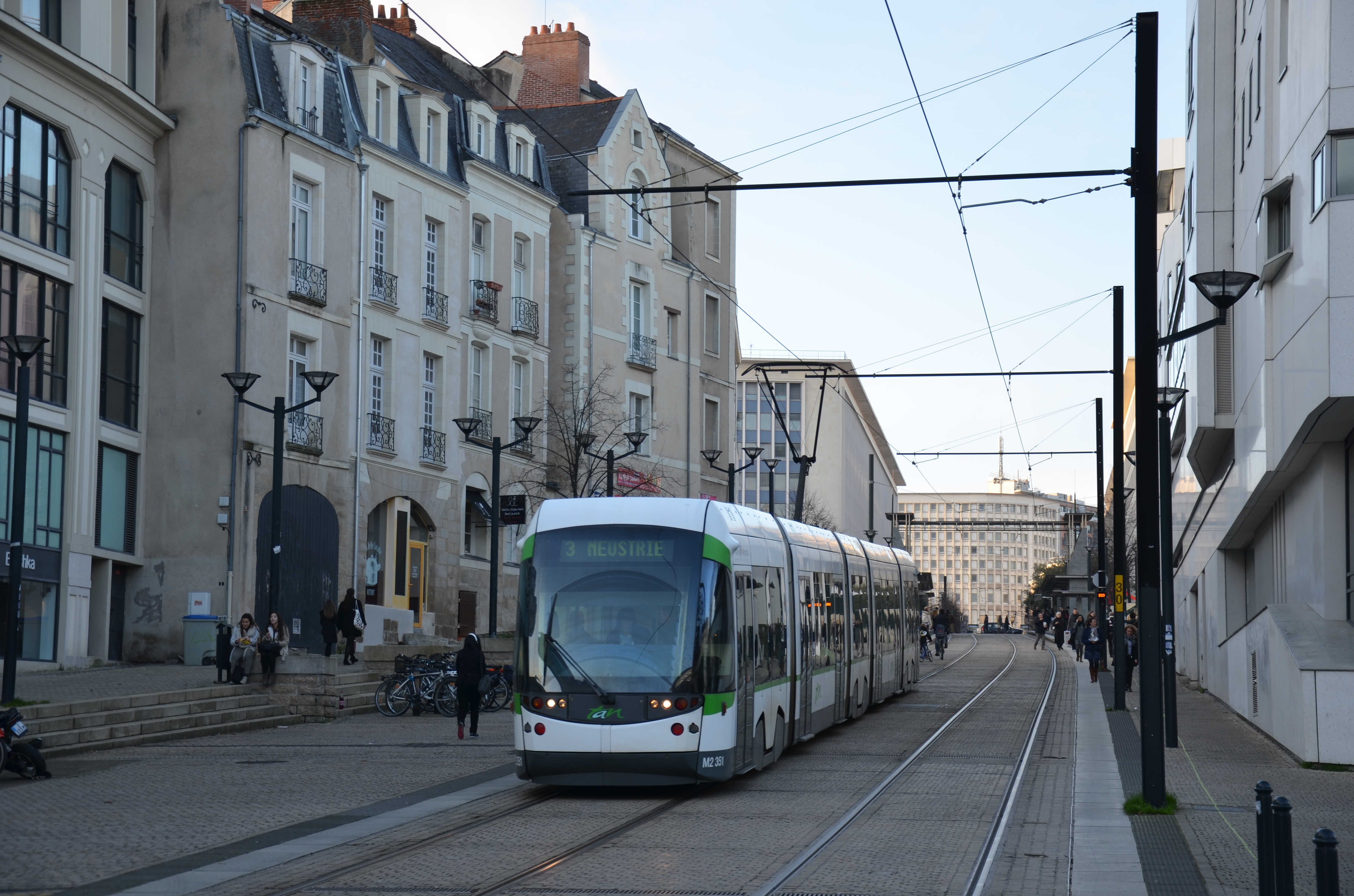 Adtranz Incentro n°351 sur la ligne 3 du tramway de Nantes, près de la station Bretagne.